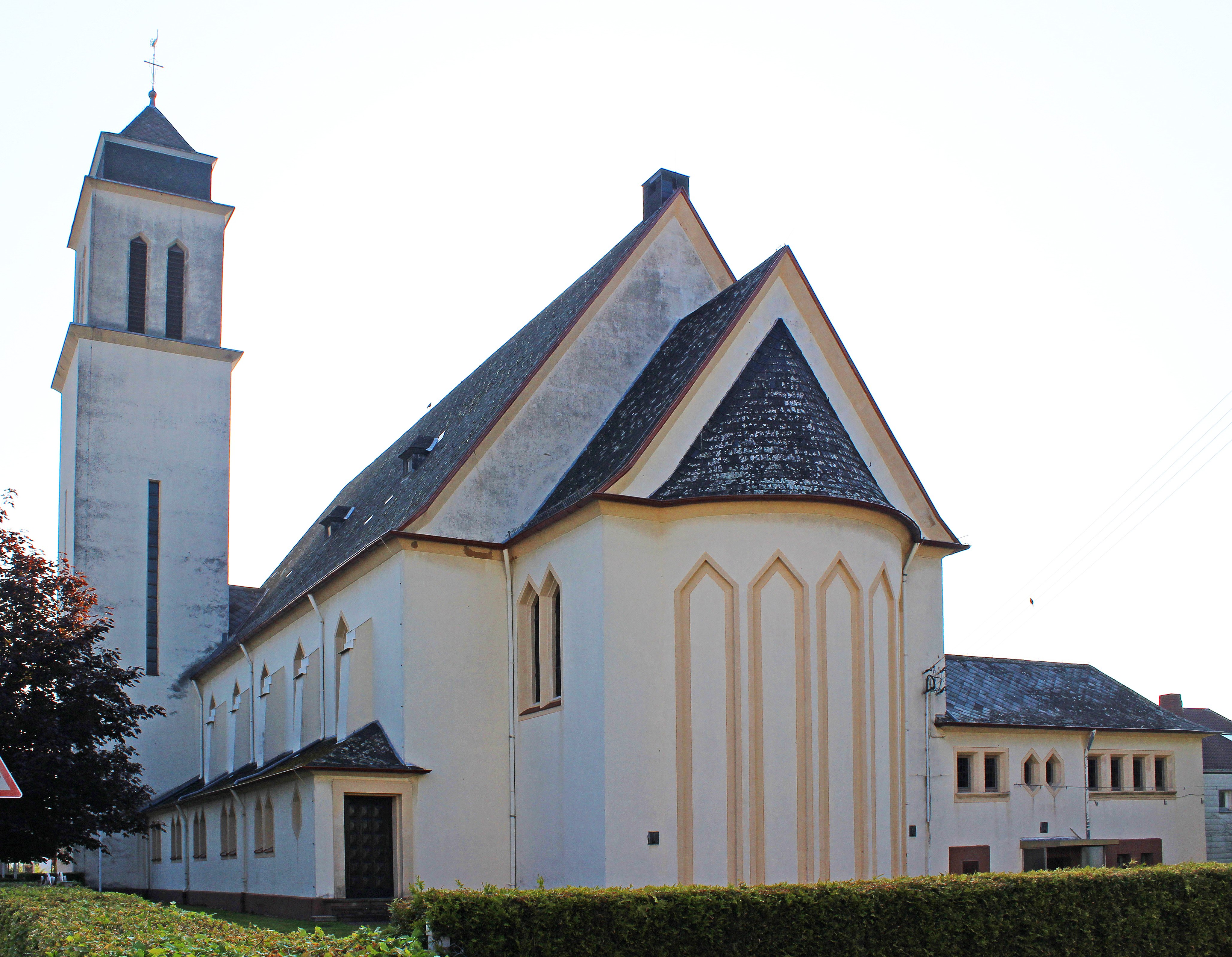 Die katholische Pfarrkirche St. Bonifatius in Püttlingen, Regionalverband Saarbrücken, Saarland